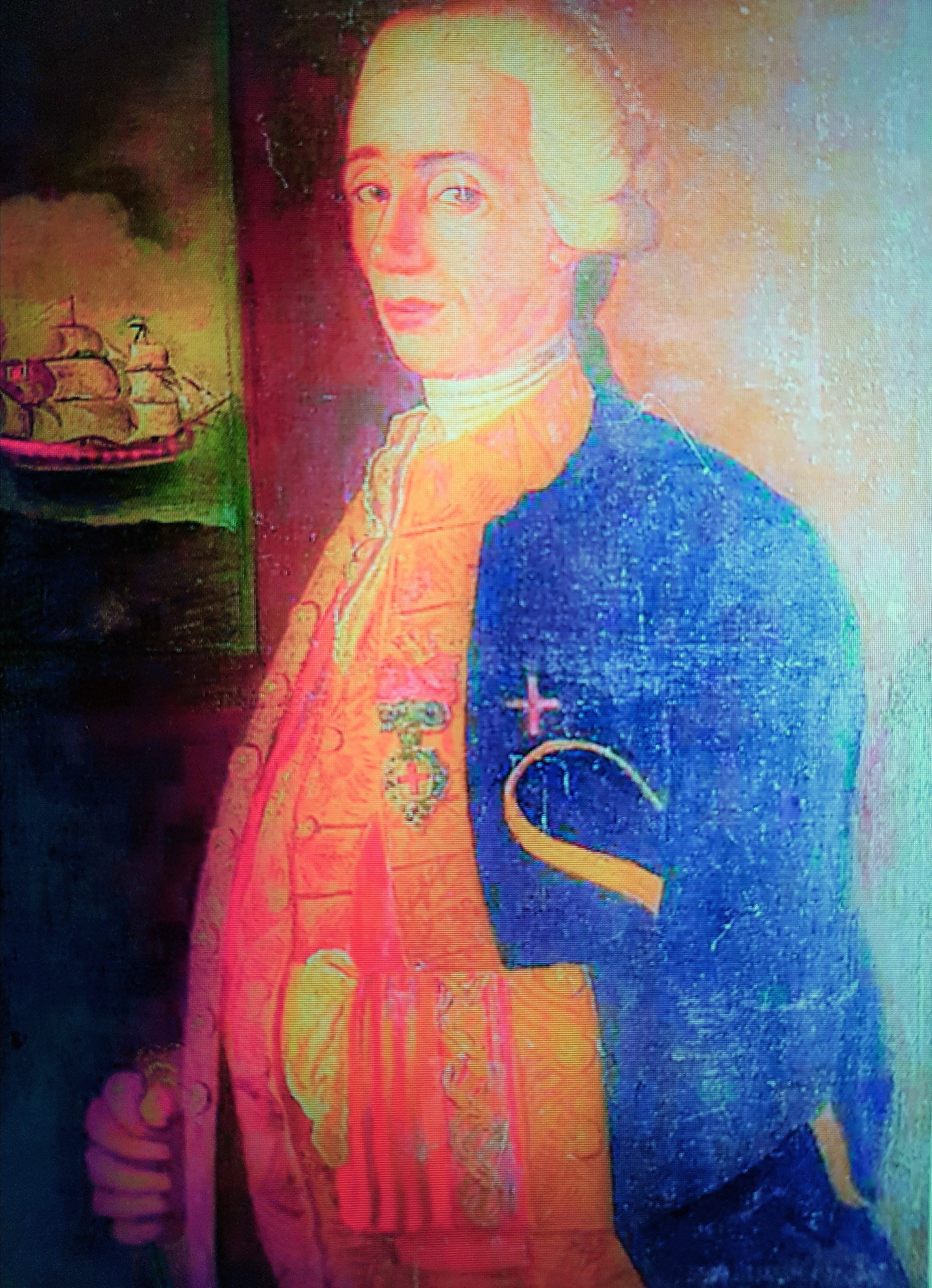 Juan Araoz y Caro con uniforme de Brigadier y venera de la Orden de Montesa, en 1780. Al fondo se ve el navío de linea de 74 cañones San Lorenzo. Escuela Sevillana. Colección Marques del Moscoso